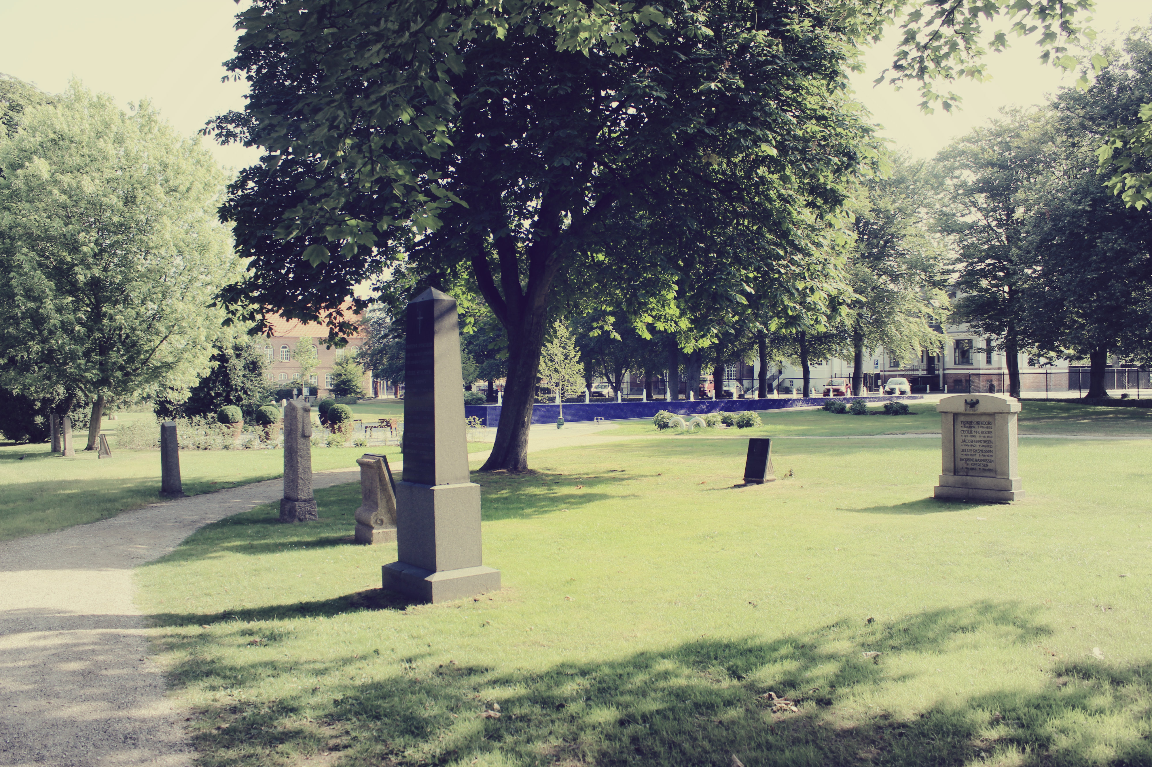 Et billede fra I.C Møllerparken i Esbjerg, Danmark